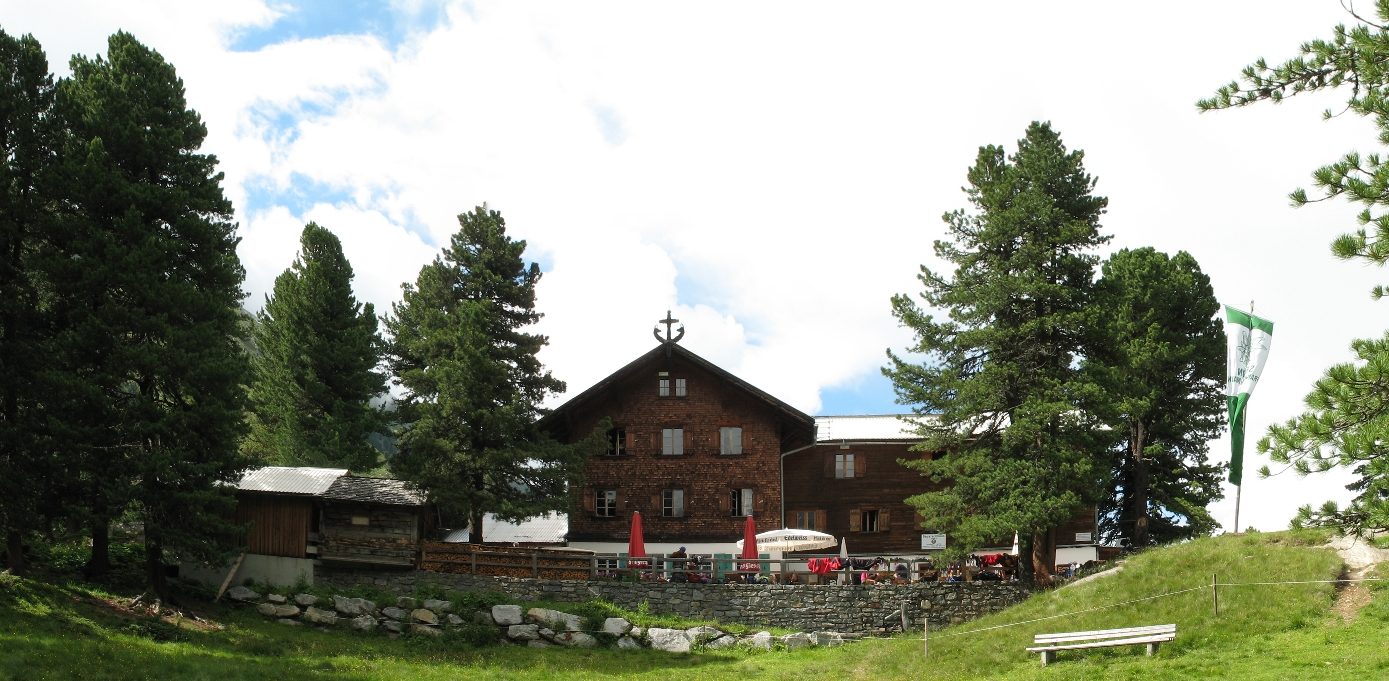 Gepatschhaus